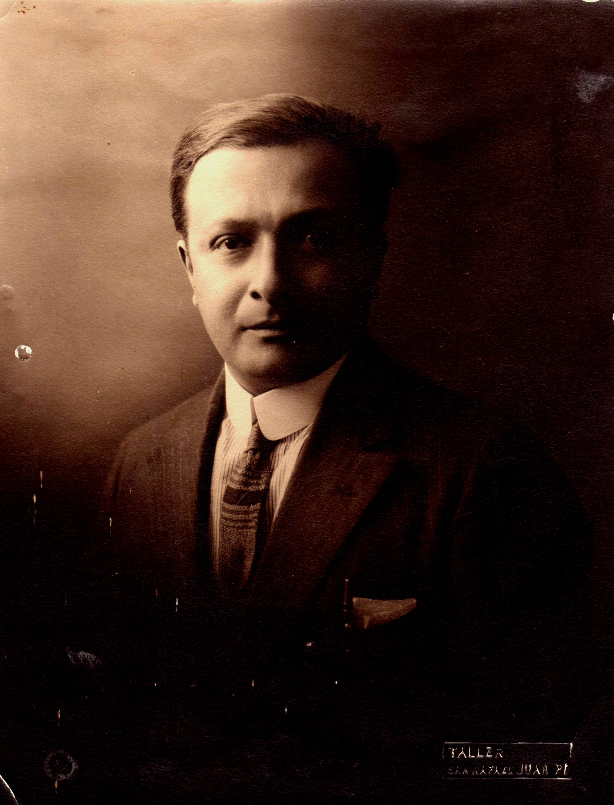 Fausto Burgos, Argentine writer